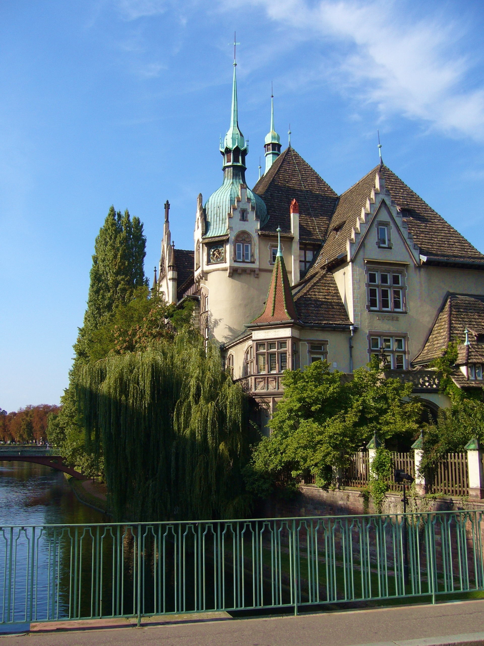 Lycée international des Pontonniers